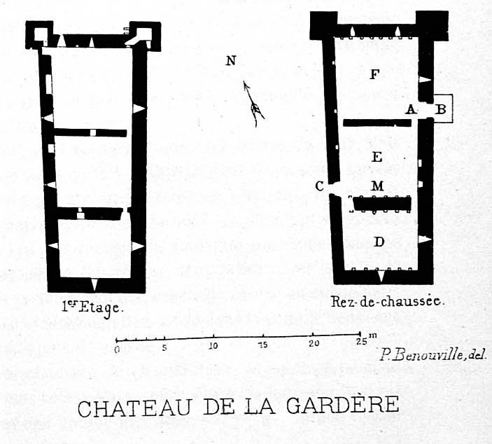 Plan du château de Lagardère, par Paul Benouville. Illustration de l’ouvrage de Ph. Lauzun « Les châteaux gascons de la fin du XIIIe siècle », Auch, G. Foix 1898.